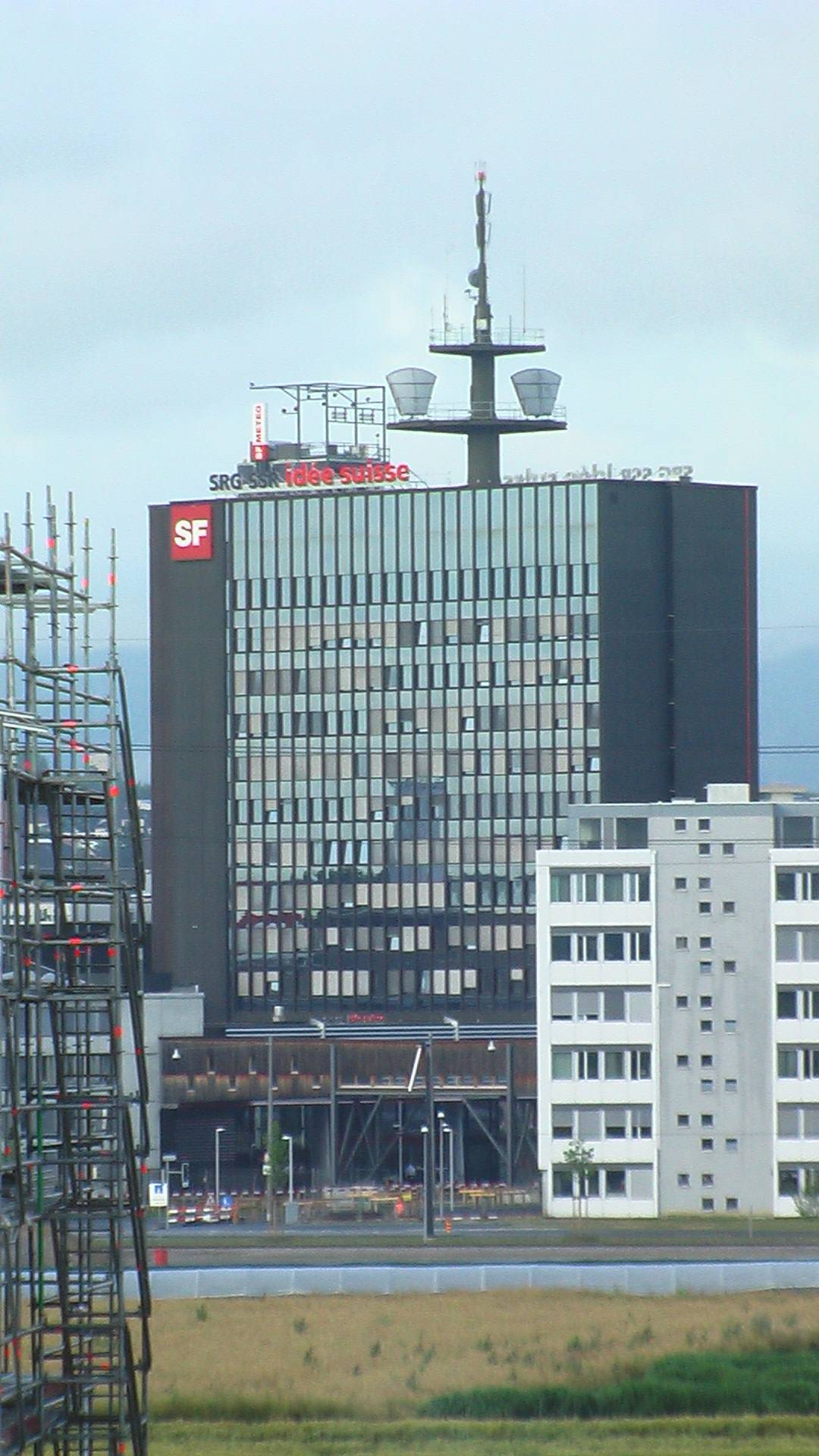 Hauptgebäude des Schweizer Fernsehens in Zürich